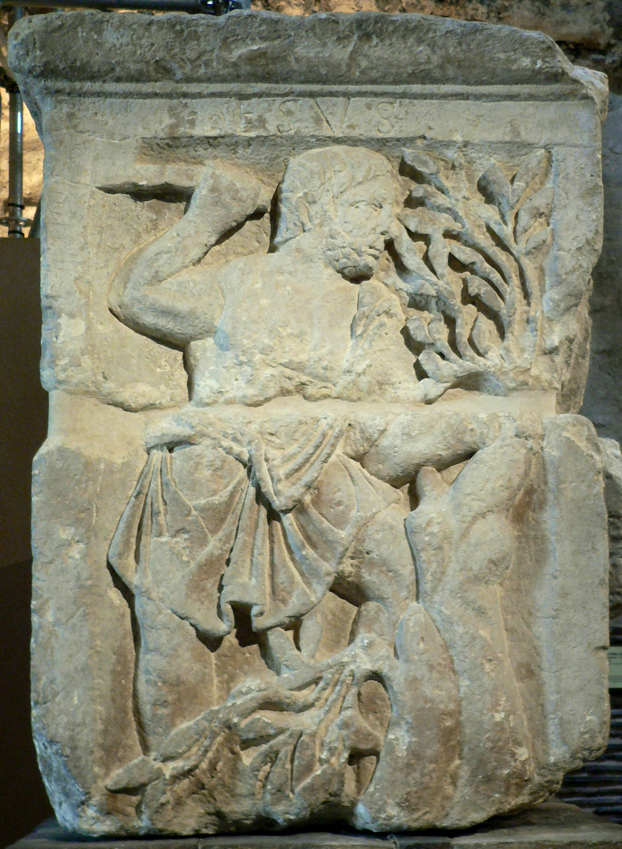 Le pilier des Nautes Esus Musée National du Moyen Age, Thermes de Cluny Source : Clio20